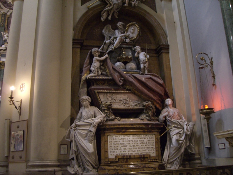 Tumba de Fernando VI de España, en la iglesia de Santa Bárbera, o de las Salesas Reales, en Madrid